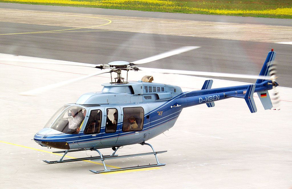 Bell Helicopters - Bell 407 (D-HBEN) auf der Flugzeugshow am Airport Niederrhein während der Geburtstagsfeier zum einjährigen Bestehen des Flughafens.